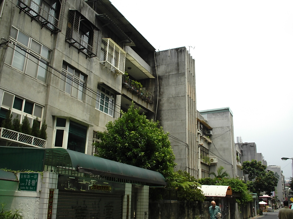 臺北市大安區國泰信義公寓，是國泰建設於臺北市推出的第一個建案。